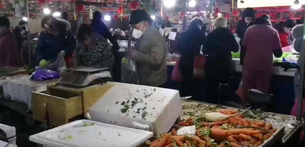 1月22日，武汉封城。武汉市民戴口罩采购易于储藏的蔬菜